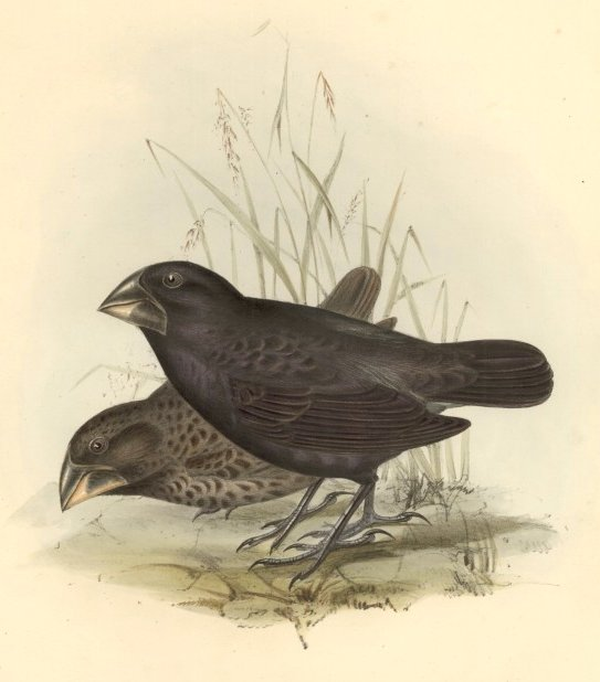 laut Bild: Geospiza fortis